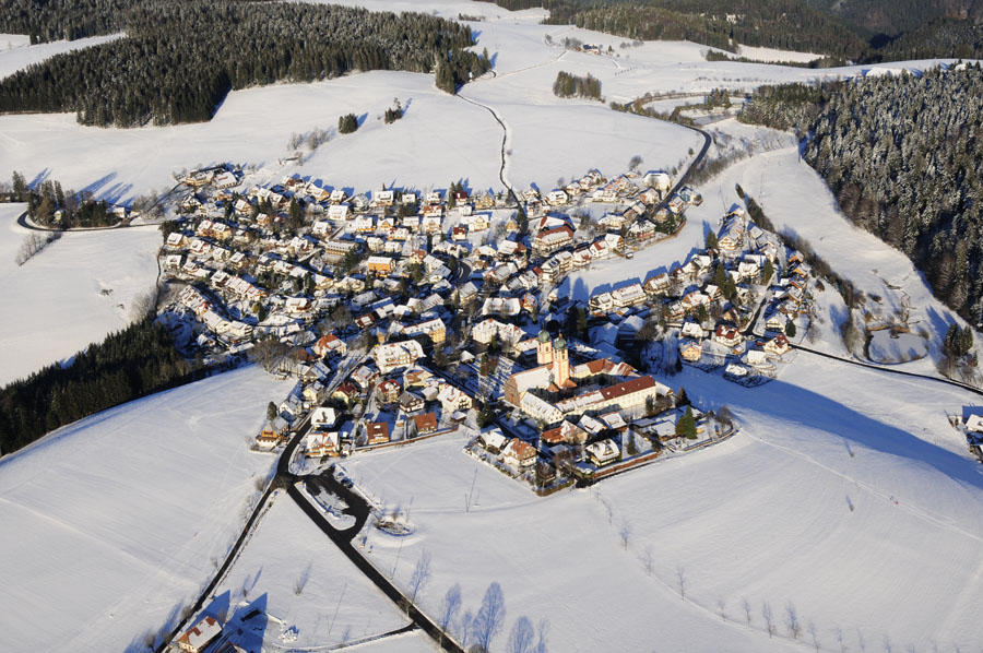 Aerial Picture Sankt Märgen (Black Forest, Germany)